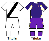 Uniformes titulares de Danubio y Defensor Sporting